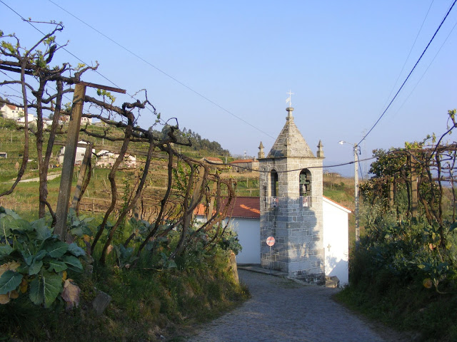 Amarante Igreja de Freixo de Cima Orago São Miguel